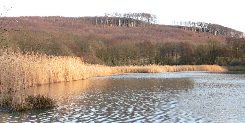 Großer Teich im Reitlingstal in Erkerode; Teich/Vordergrund im Naturschutzgebiet „Reitlingstal“, Wald/Hintergrund im Landschaftsschutzgebiet „Elm“